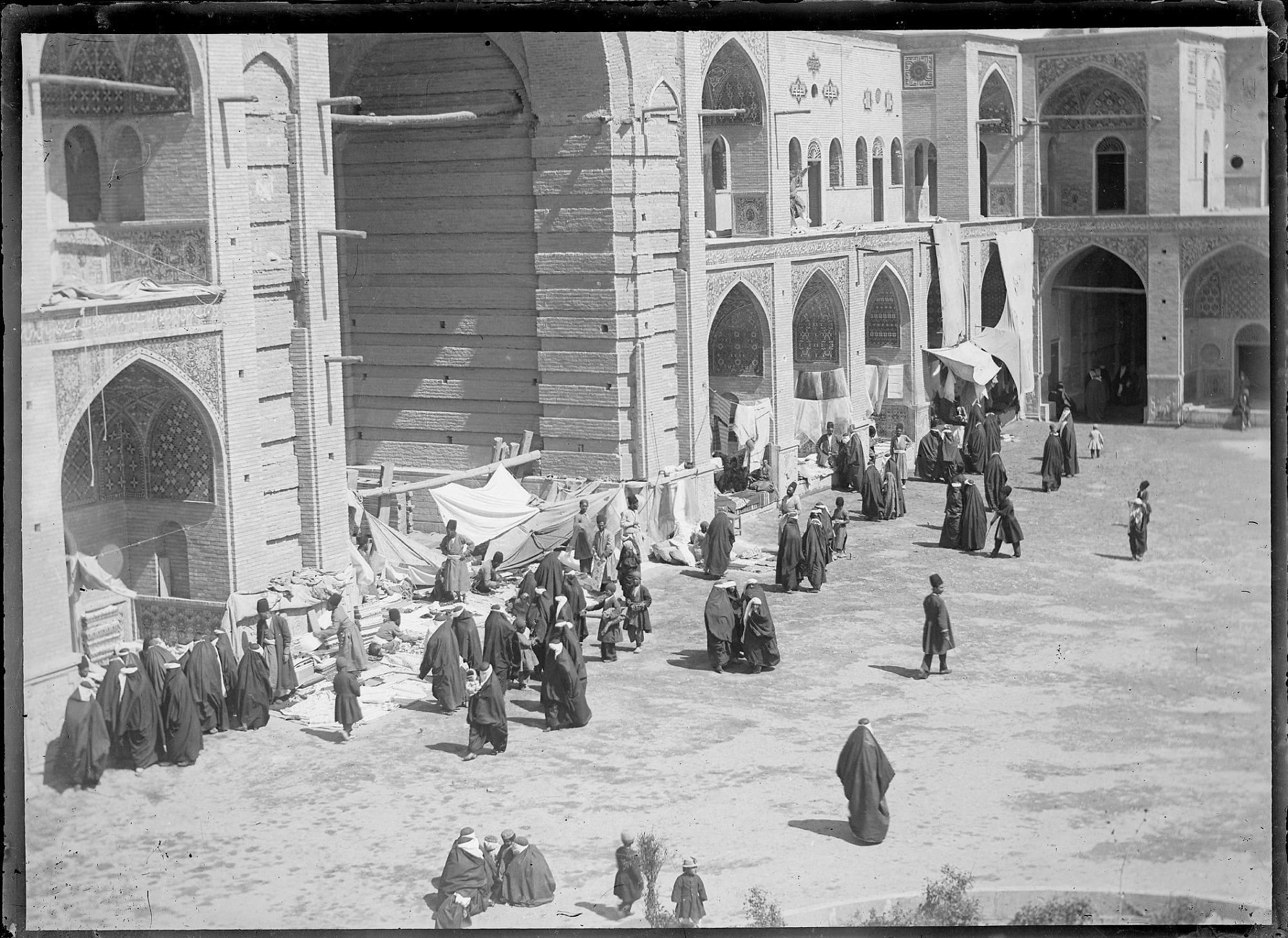 مسجد سپهسالار اثر آنتوان سوریوگین - دوره قاجار